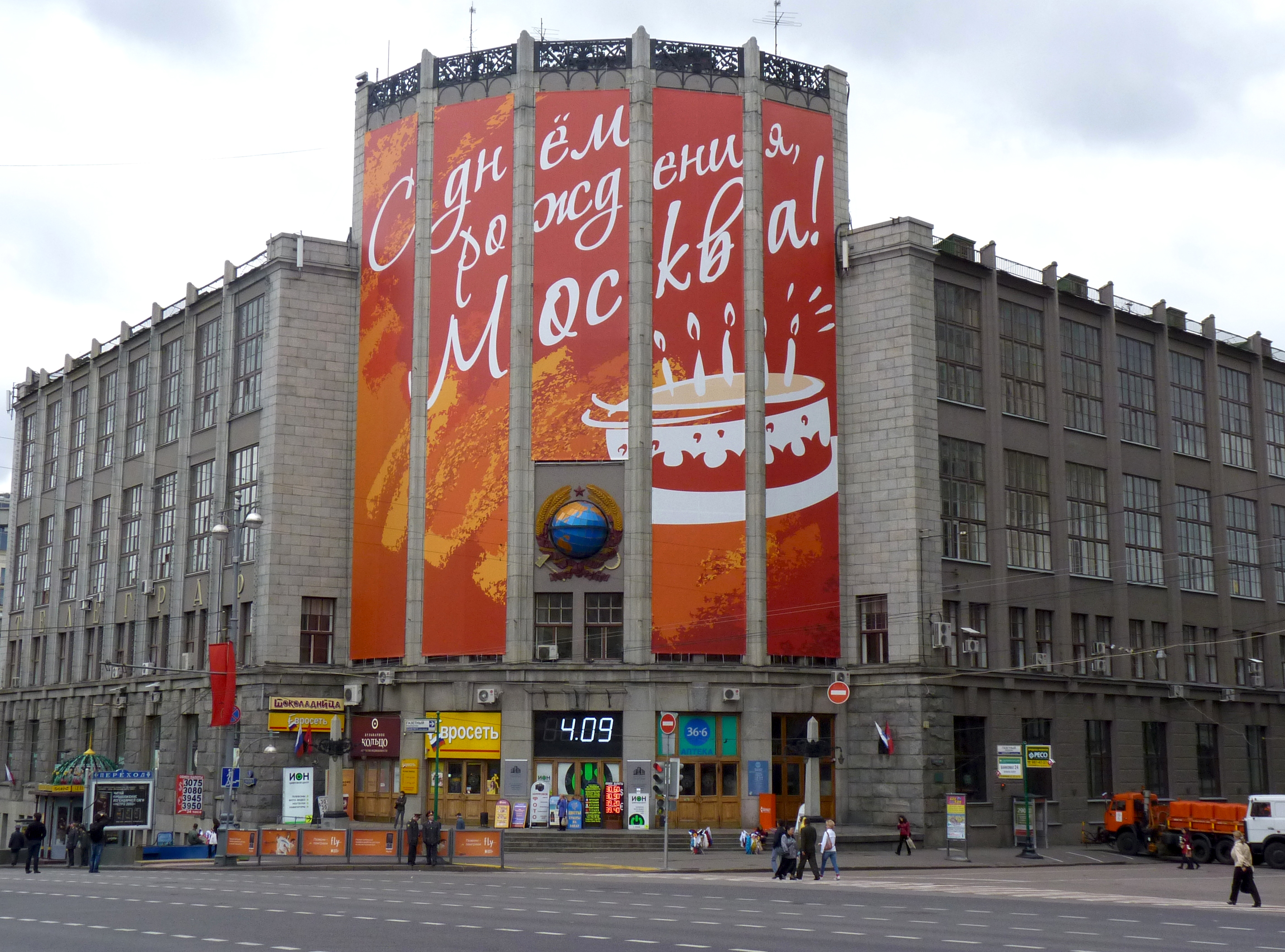 Здание центрального телеграфа (Москва и Московская область, Москва, Тверская улица, 7)